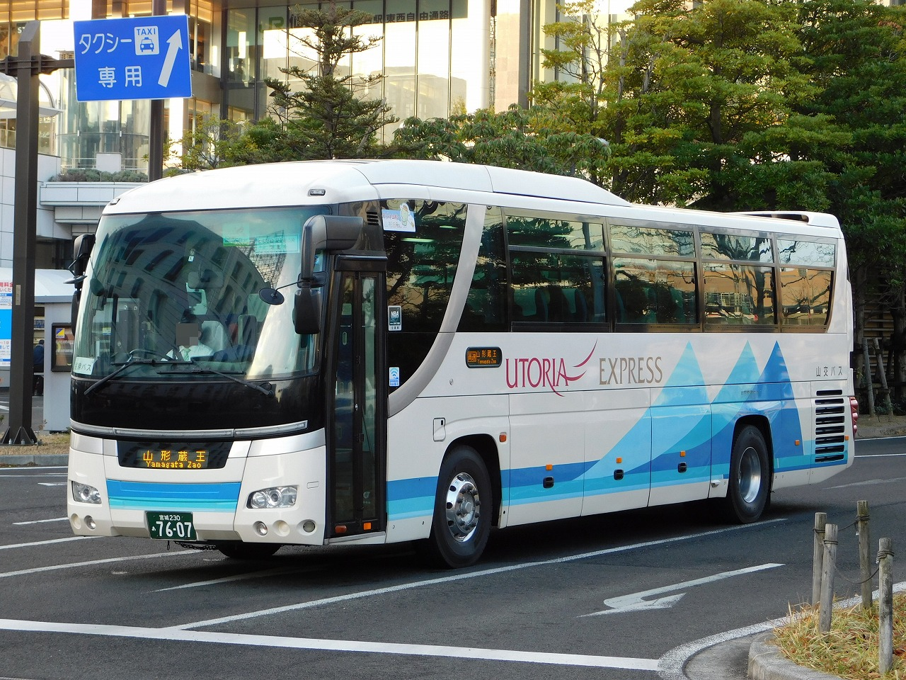 山交バス 日野・セレガ高速バス「仙台 - 山形蔵王線」で運用中